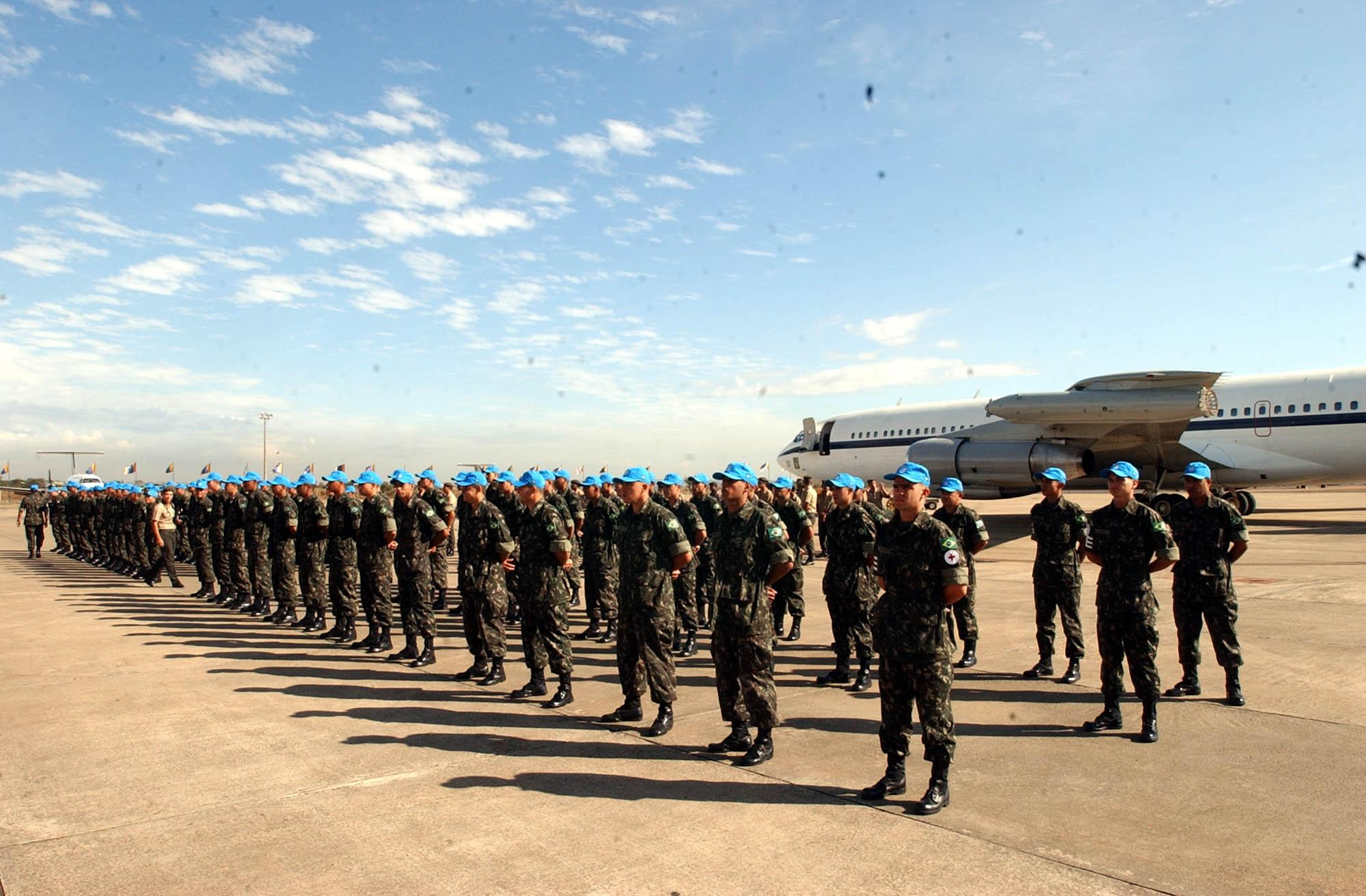 Brasília - Militares brasileiros (75) aguardam a ordem de embarque com destino ao Timor Leste, para integrar a força de paz da ONU, no Timor Leste.